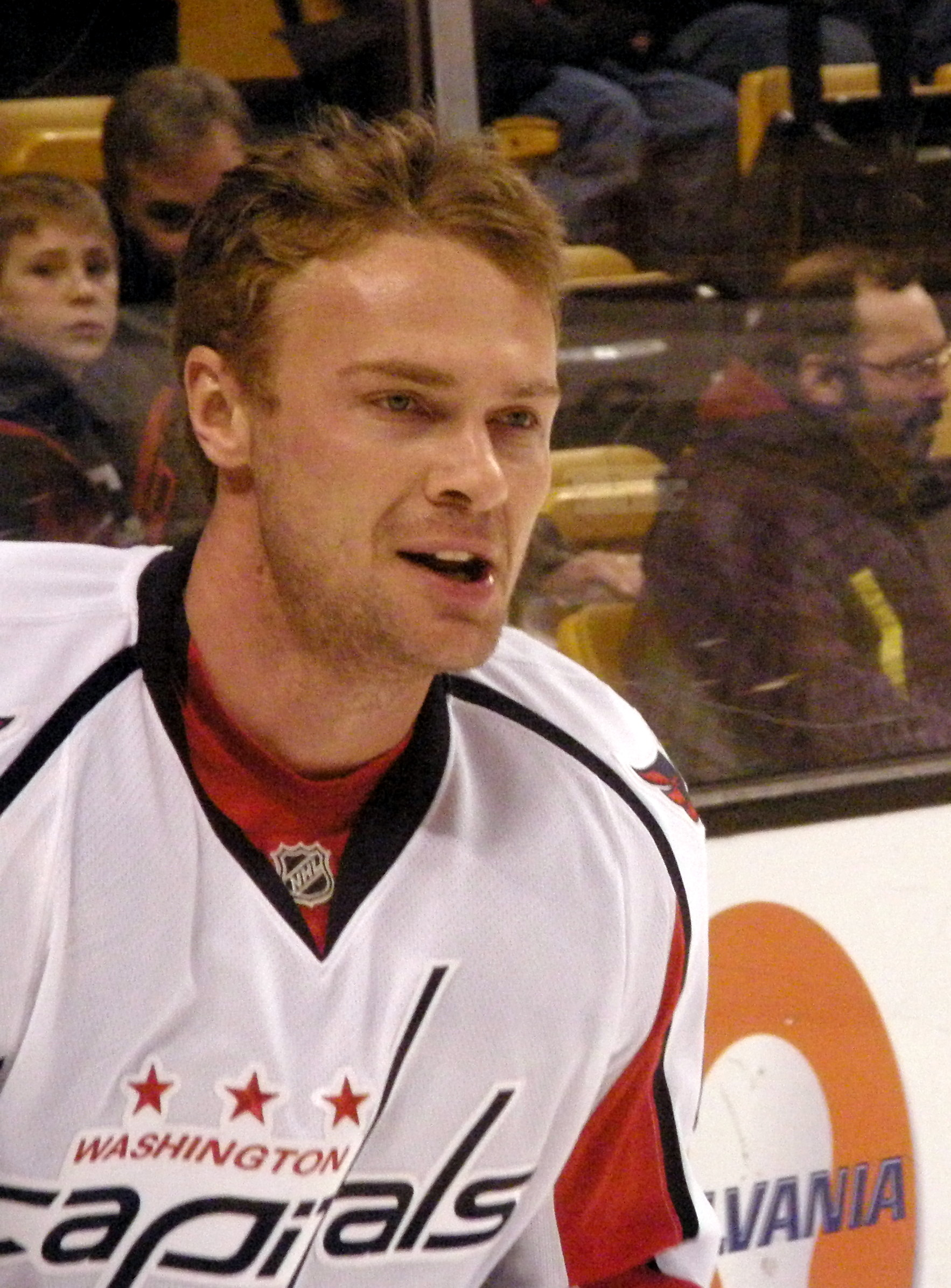 #25 Viktor Kozlov